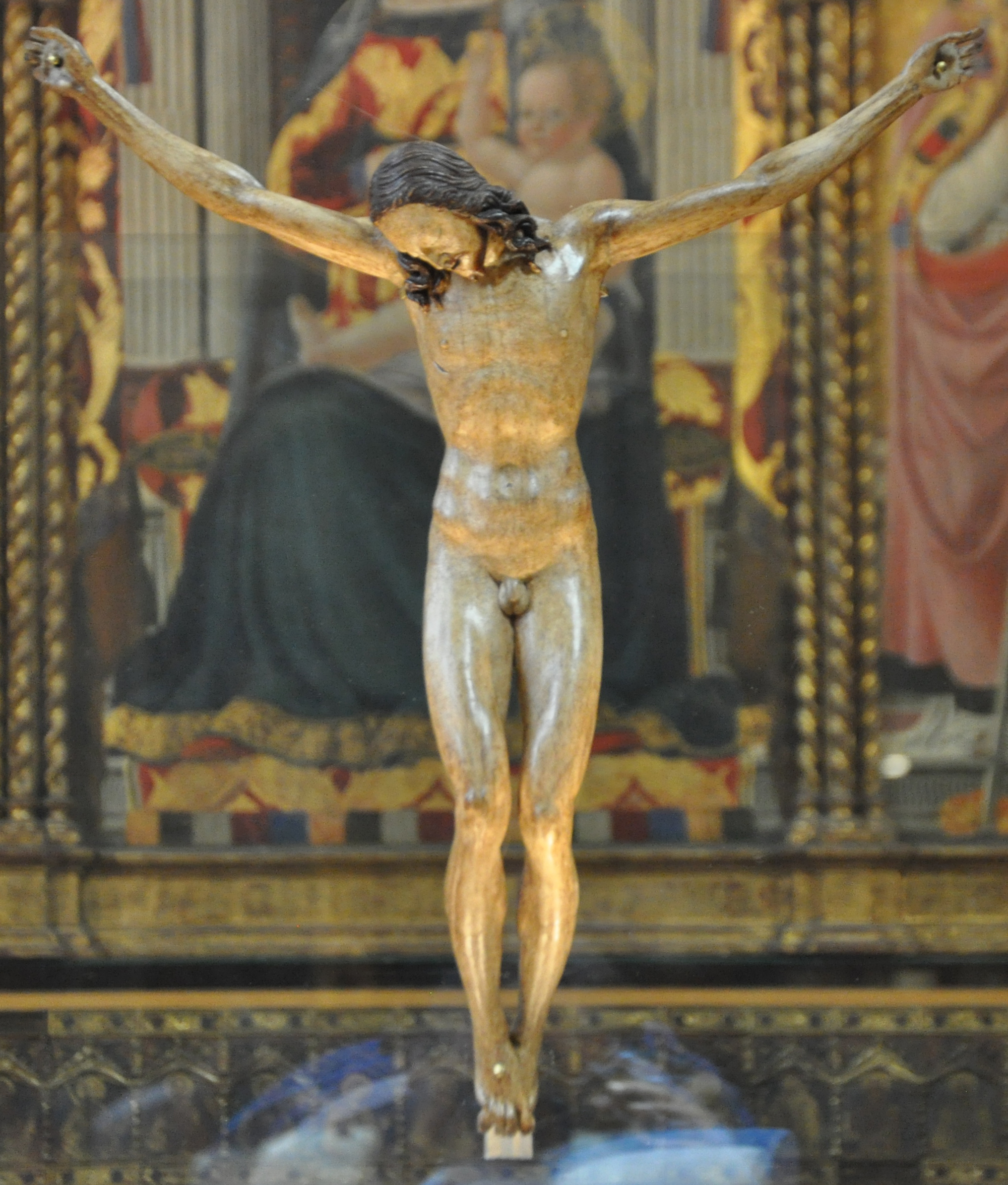 Crocifisso in legno attribuito a Michelangelo così come compare nella teca di vetro all'interno della Cappella del Podestà, Museo Nazionale del Bargello, Firenze